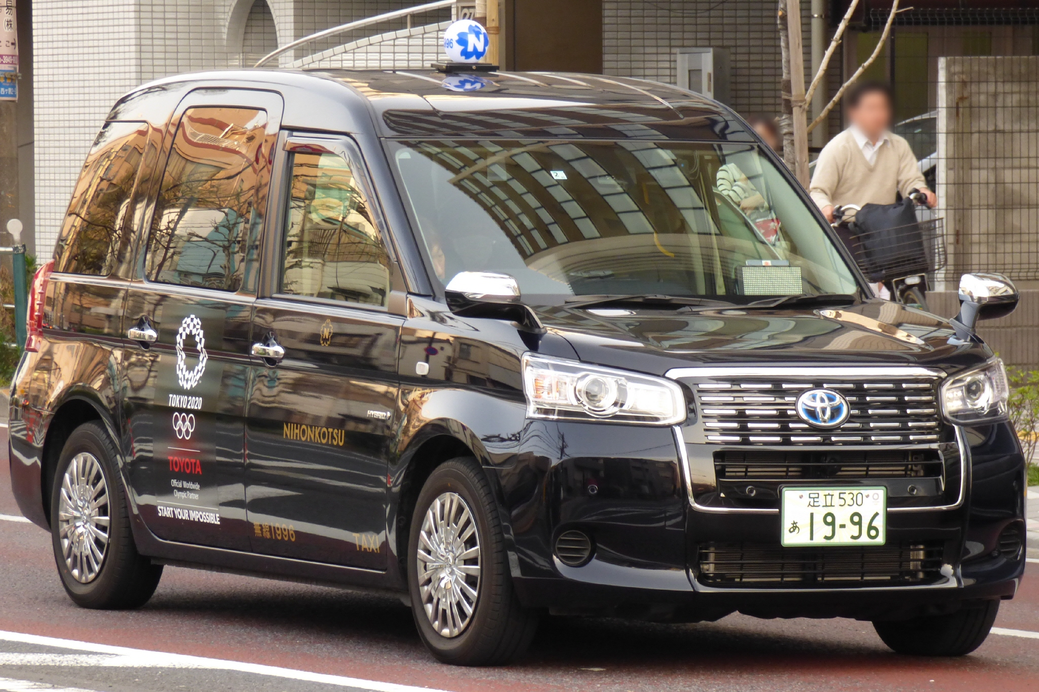 表記類の色が青色の行灯を載せた、日本交通(東京都)のジャパンタクシー。